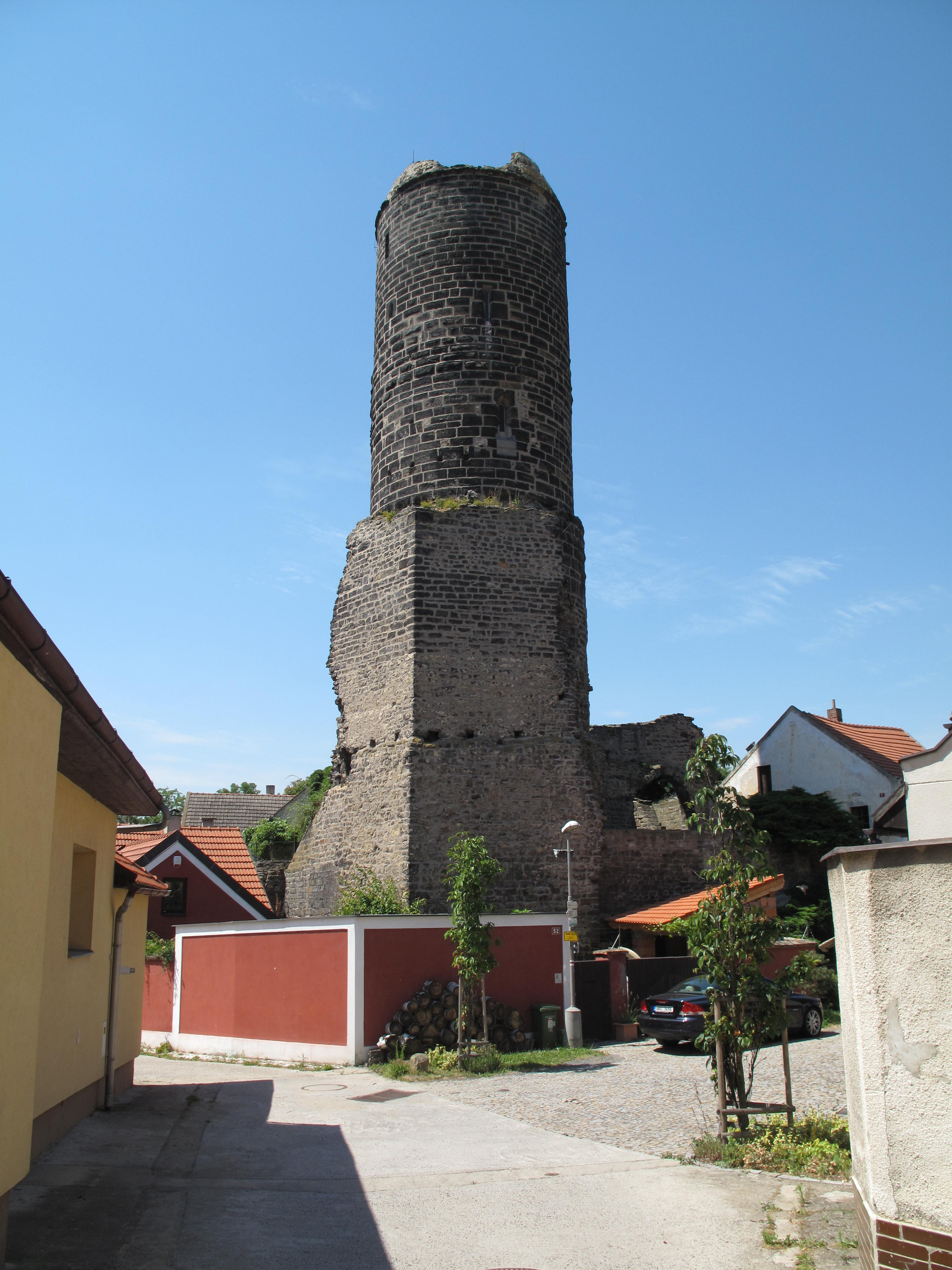 Česky: Jenštejn